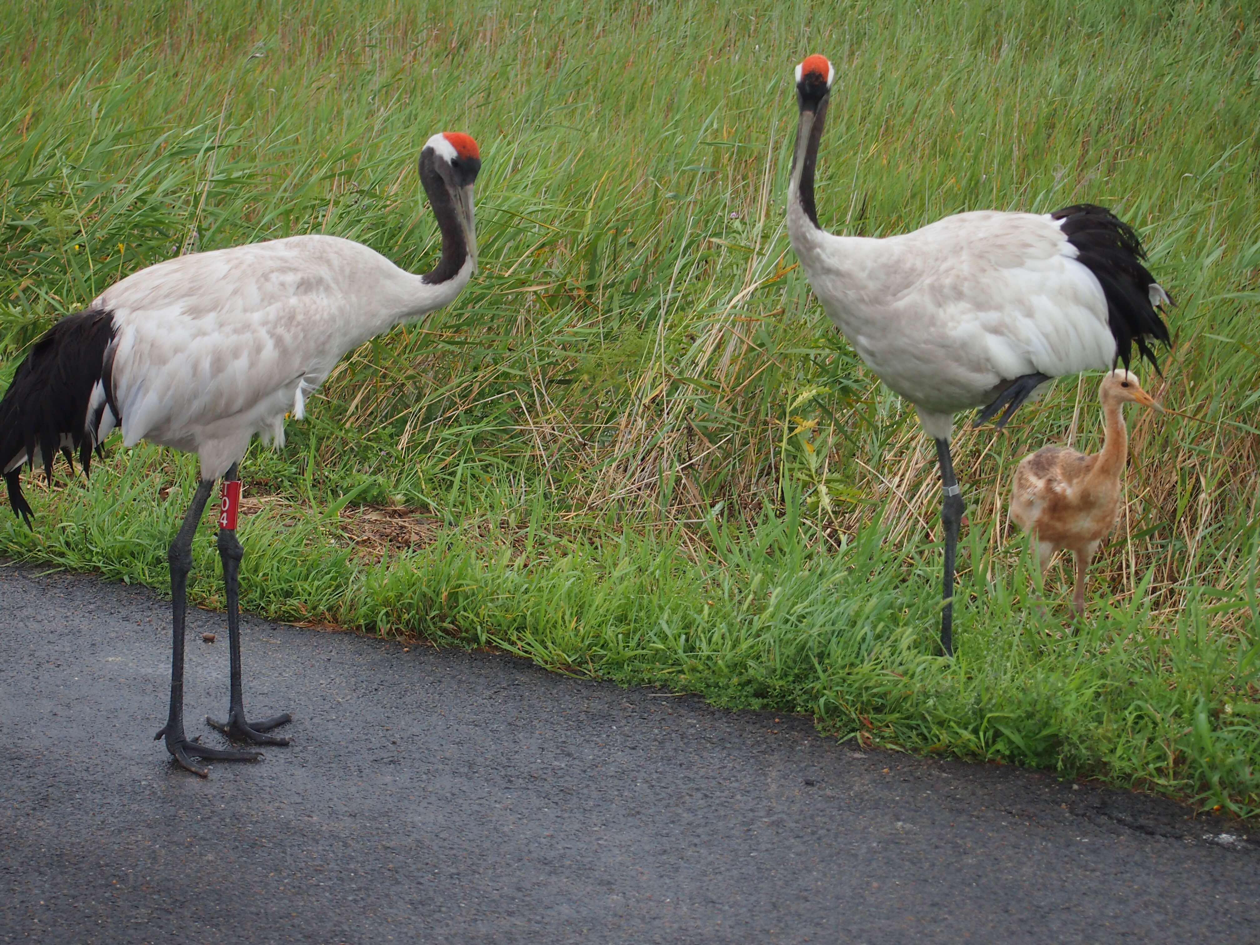 在黑龙江扎龙国家级自然保护区观光旅游时拍摄到的两只丹顶鹤与丹顶鹤幼鸟的图片